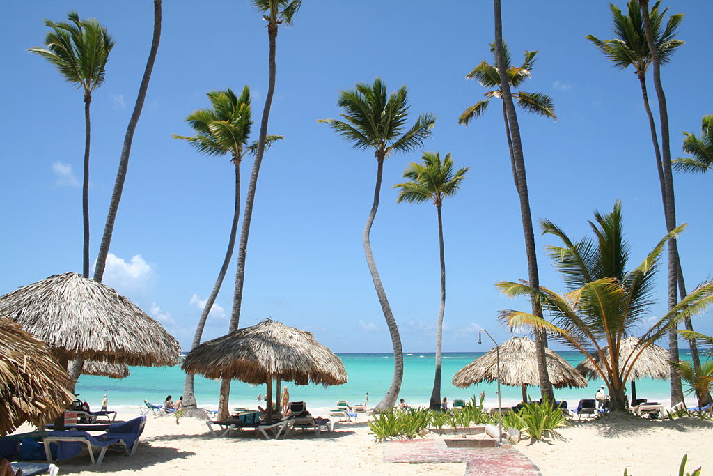 Punta Cana beach, Dominicana